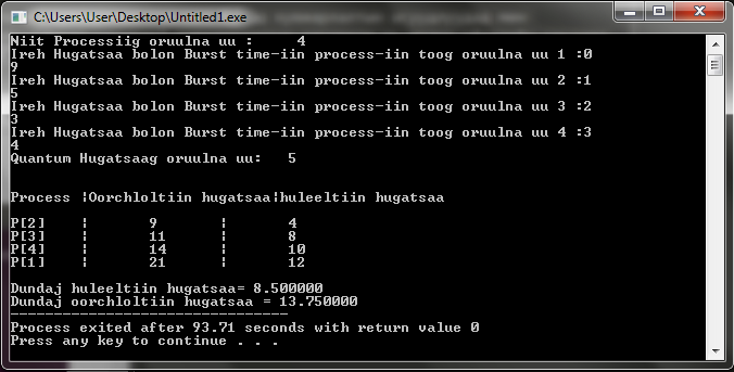 Монгол: "Эргэх цагираг" төлөлвлөлтийн алглритмийн жишээ кодын үр дүн